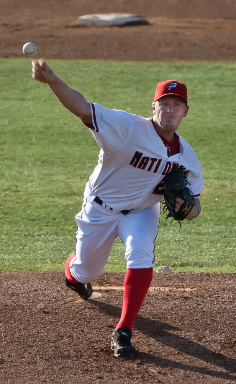 Jordan Zimmermann